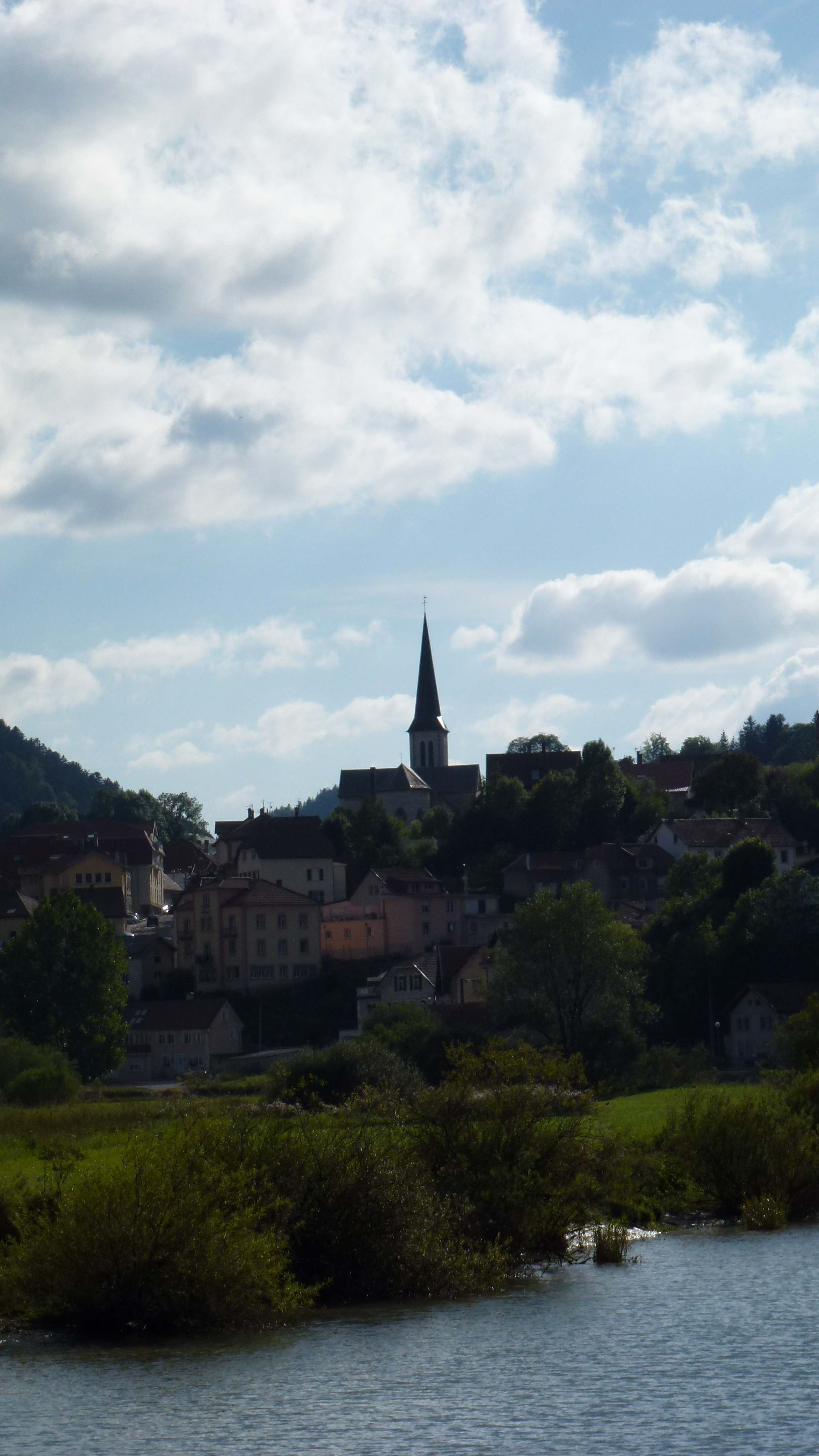 Eglise Saint-Jean (XIXe S.). La plus grande des quatre églises de Villers-le-Lac. La flèche culmine à 40 m.